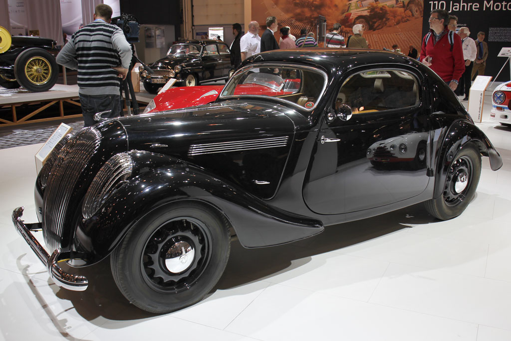 1937 Skoda Popular Sport Monte Carlo Coupe_IMG_3062